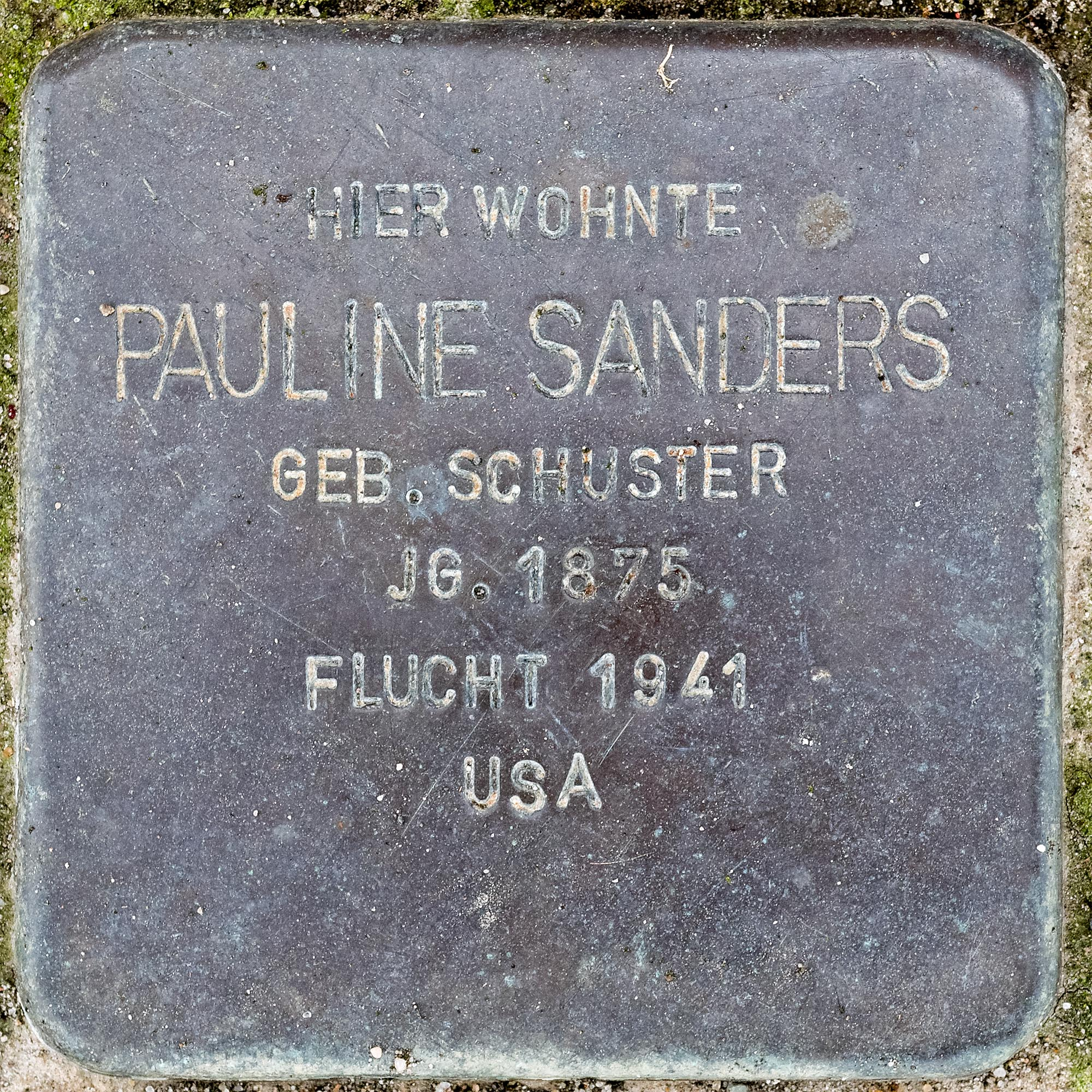 Stolperstein Sanders, Pauline